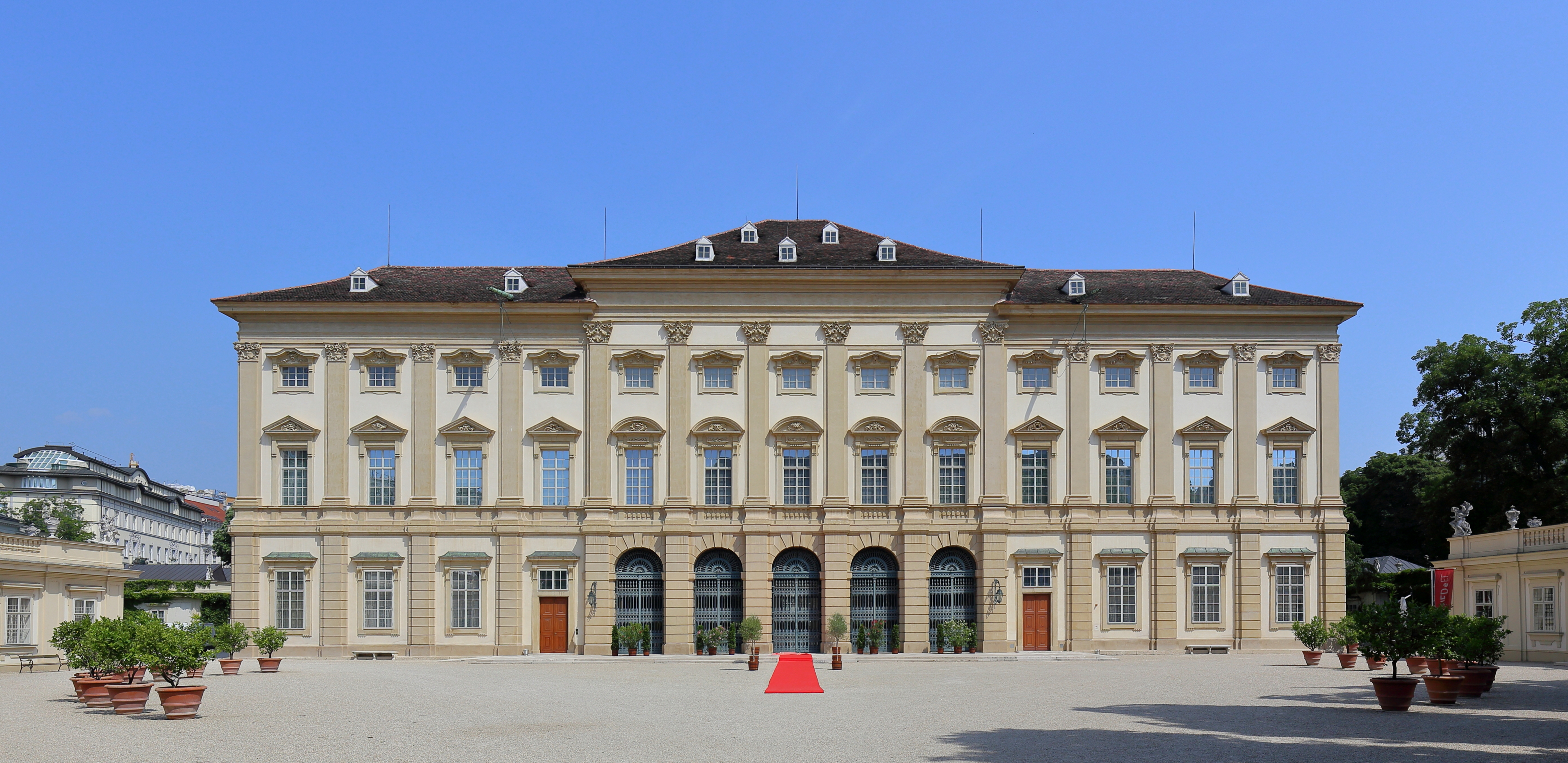 Die Hauptfront beziehungsweise Südansicht des Palais Liechtenstein in der Fürstengasse in der Rossau, ein Bezirksteil des 9. Wiener Gemeindebezirkes Alsergrund.Das Liechtensteinsche Sommer(Garten)palais ließ Fürst Hans Adam I. von Liechtenstein errichten. Es entstand in zwei Bauphasen. In der ersten wurde das Palais von 1691 bis 1694 nach Plänen von Domenico Egidio Rossi errichtet. Nach einigen Abänderungen des vorhandenen Bauwerkes wurde von 1700 bis 1705/06 das Palais nach Plänen von Domenico Martinelli fertiggestellt. Die Innenausstattung erfolgte von 1704 bis 1709 und die Errichtung der Nebengebäude von 1705 bis 1711. Ursprünglich war nordseitig ein Pavillon, dieser wurde von 1873 bis 1875 durch ein von Heinrich Ferstel errichtetes Gartenpalais für die Fürstenwitwe ersetzt.